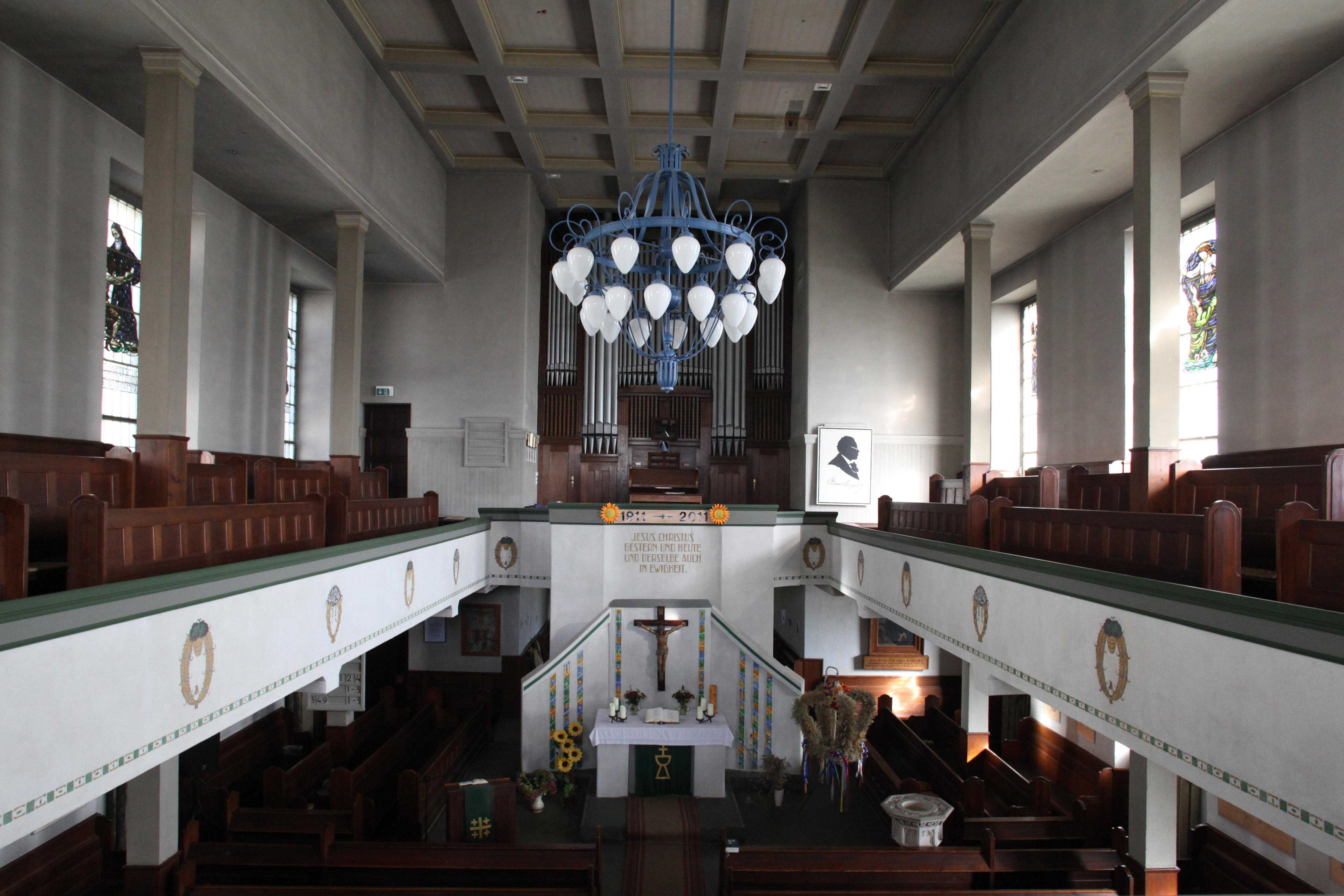 Evangelisch-Lutherische Kirche in Lauscha, Jugendstil, Saalkirche mit Walmdach, 1911, von Julius Zeißig